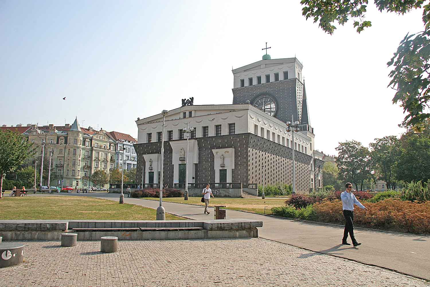 Kostel Nejsvětějšího srdce Páně od Josipa Plečnika na náměstí Jiřího z Poděbrad na Vinohradech autor:Zp